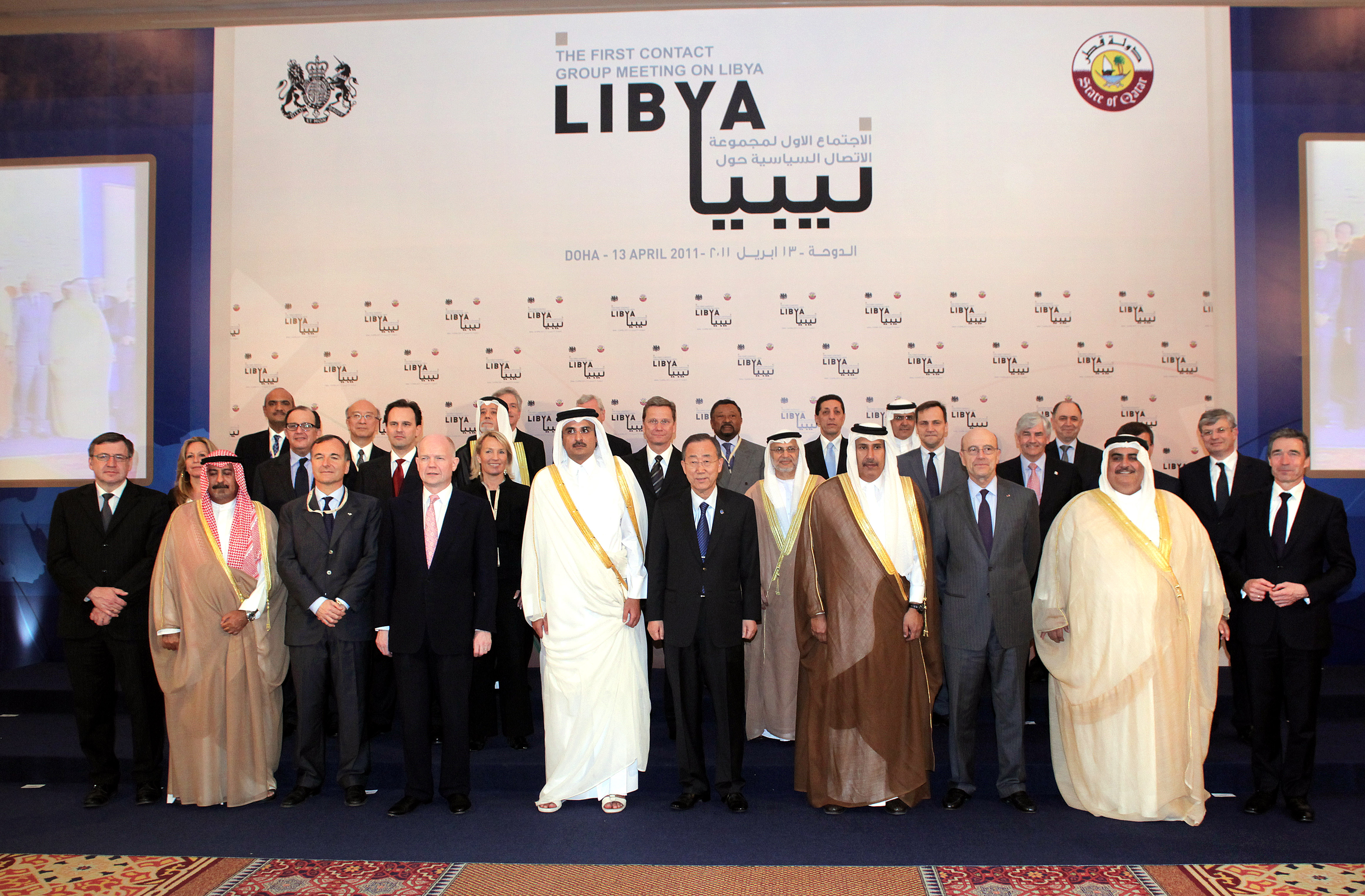 Την Τετάρτη 13 Απριλίου, ο Υπουργός Εξωτερικών Δημήτρης Δρούτσας επισκέφθηκε τη Ντόχα του Κατάρ, προκειμένου να συμμετάσχει στην πρώτη συνάντηση της διεθνούς Ομάδας Επαφής για τη Λιβύη. Στη συνάντηση συμμετείχαν ο Γενικός Γραμματέας των Ηνωμένων Εθνών κ. Ban Ki-Moon, Υπουργοί Εξωτερικών 21 χωρών, και εκπρόσωποι διεθνών και περιφερειακών οργανισμών. Foreign Minister Dimitris Droutsas visited Doha, Qatar, on Wednesday, 13 April 2011, to participate in the first meeting of the international Contact Group on Libya. The Secretary-General of the United Nations Mr. Ban Ki-Moon, the Foreign Ministers of 21 countries, and representatives of international and regional organizations participated in the meeting.